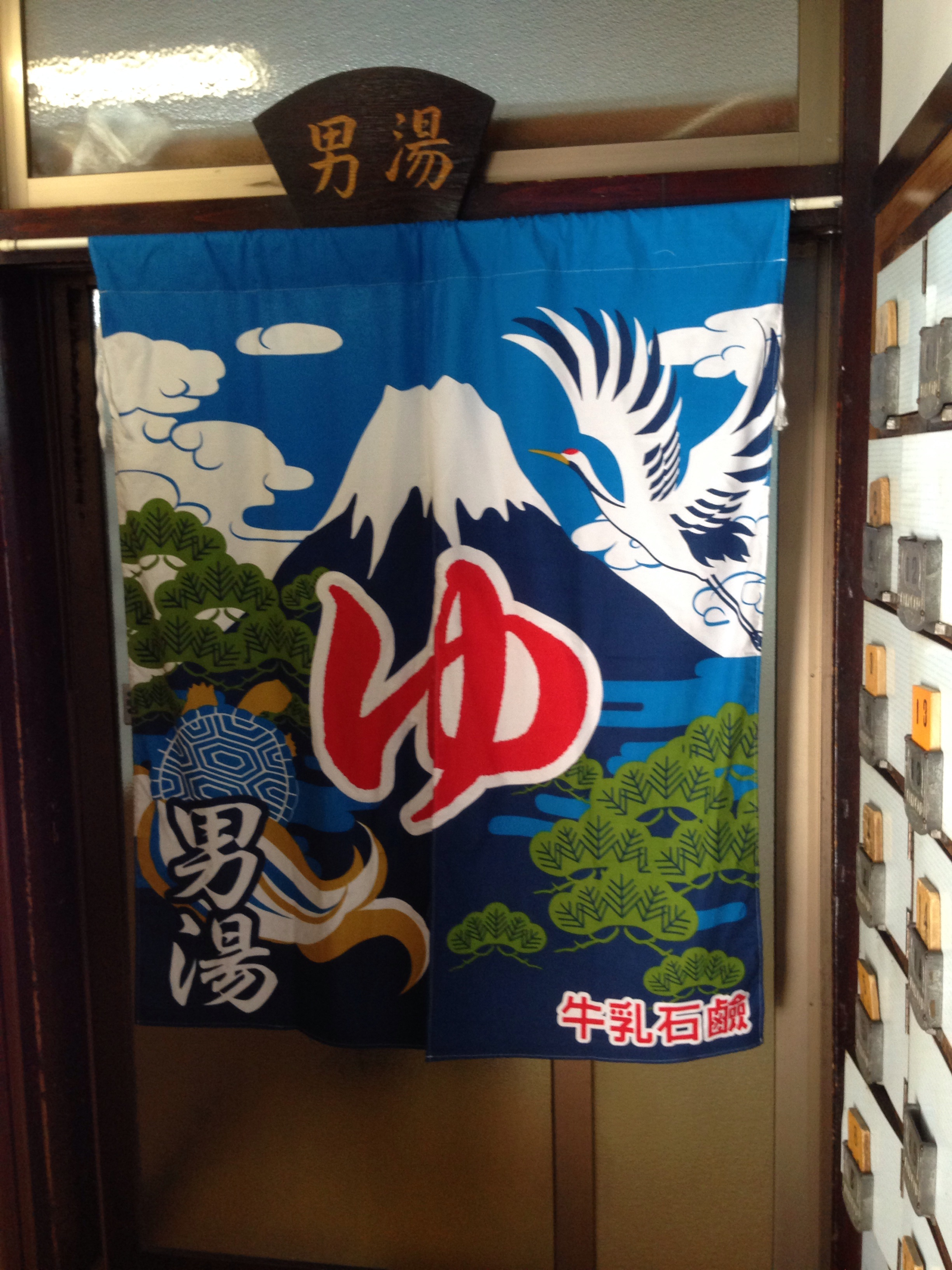 東京の上野にある有形文化財の銭湯「燕湯」、男湯入り口ののれん。